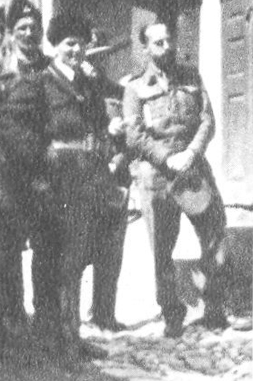 Srpskohrvatski / српскохрватски: Partizanski komandant Tito i britanski oficir Terence Atherton u oslobođenoj Foči 1942.